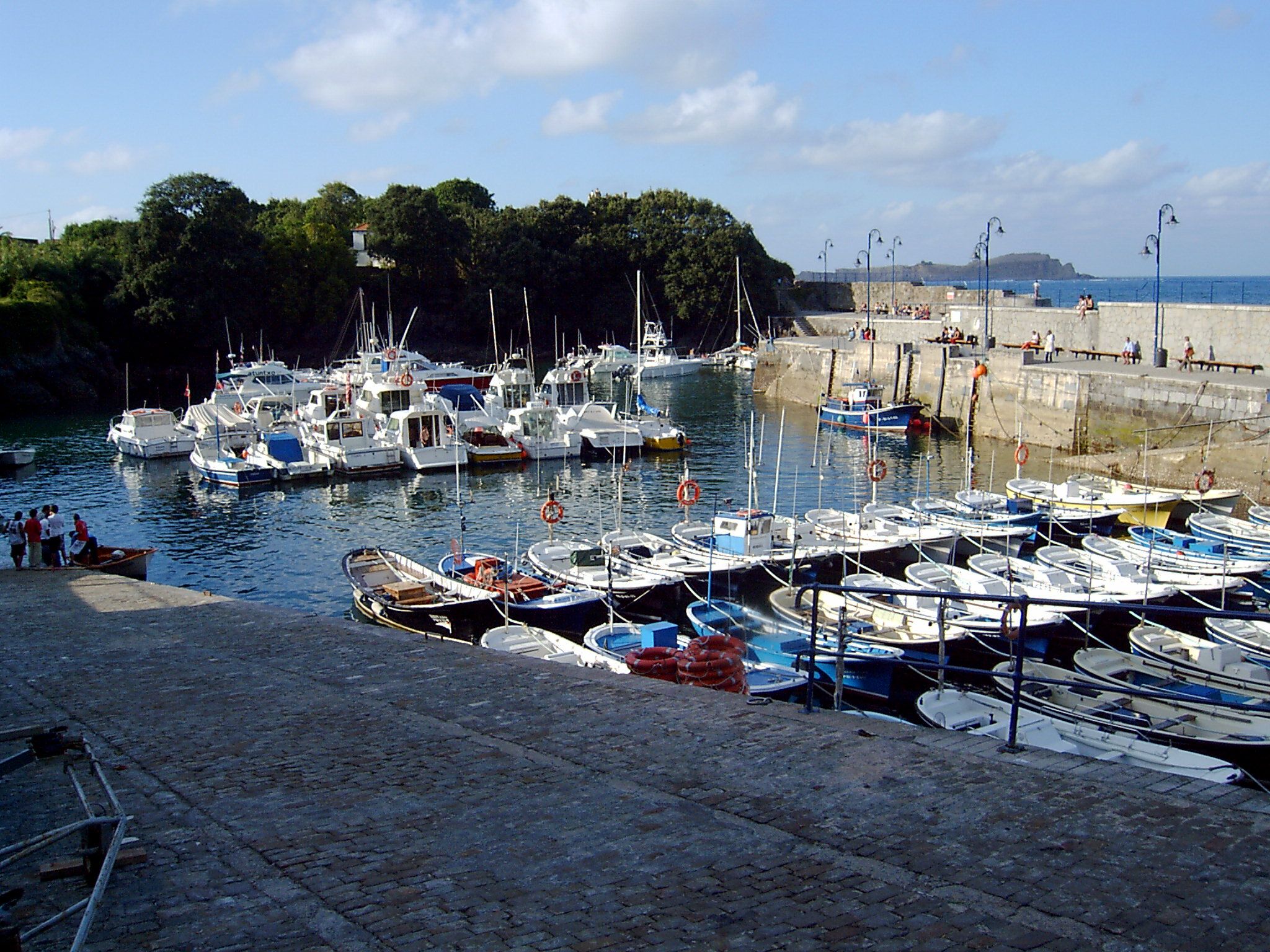 Mundaka port